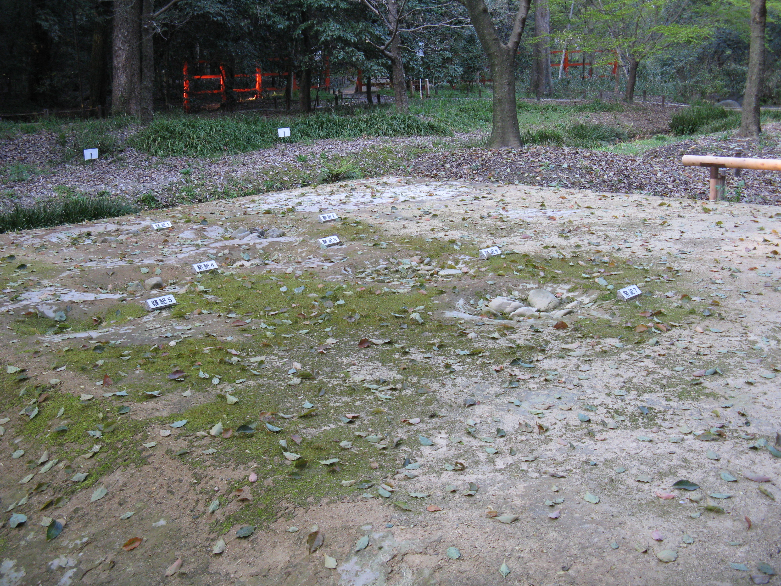 賀茂御祖神社（下鴨神社） 糺の森の祭祀遺構